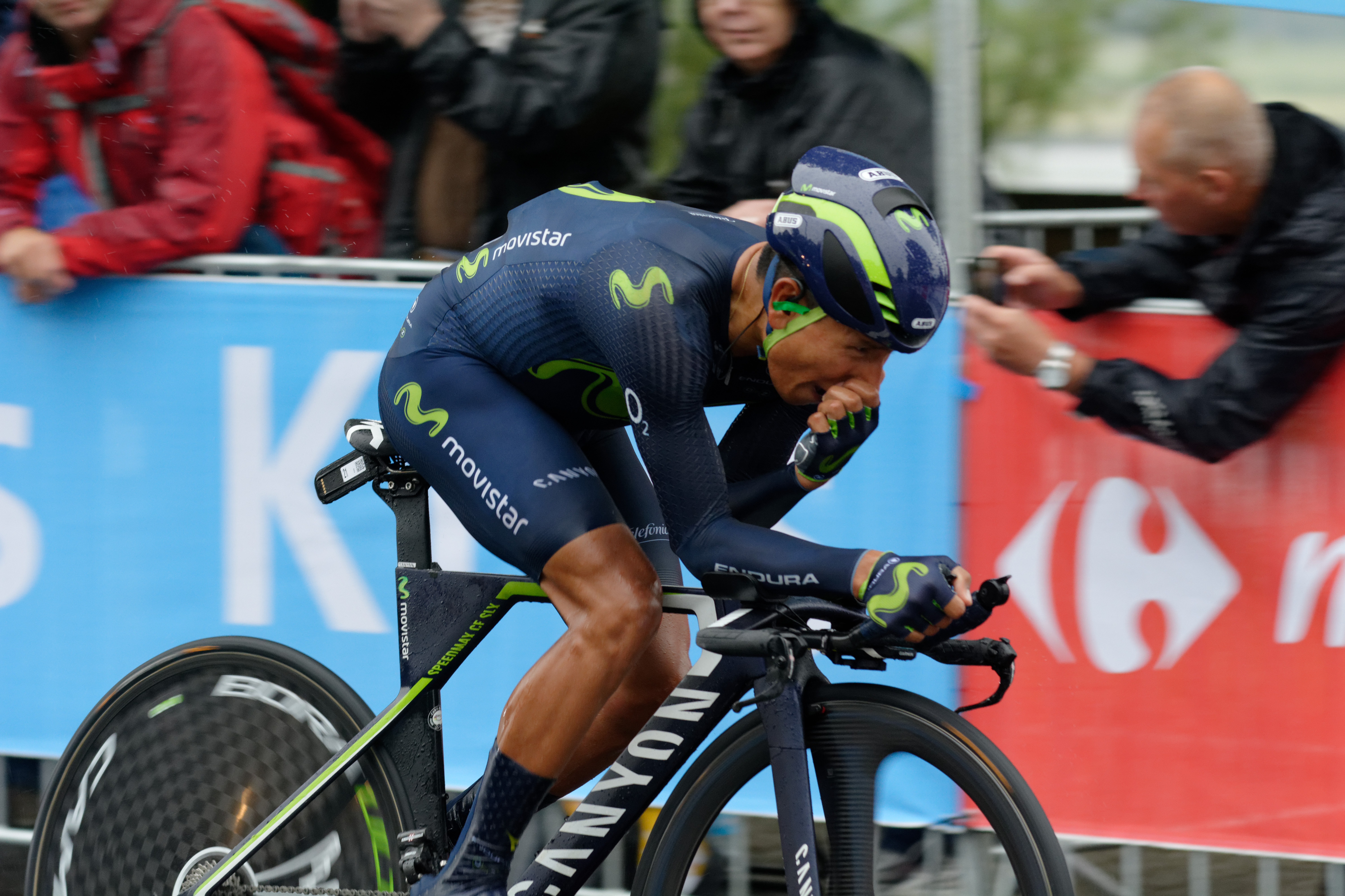 Tour de France 2017 Stage 1 Duesseldolf